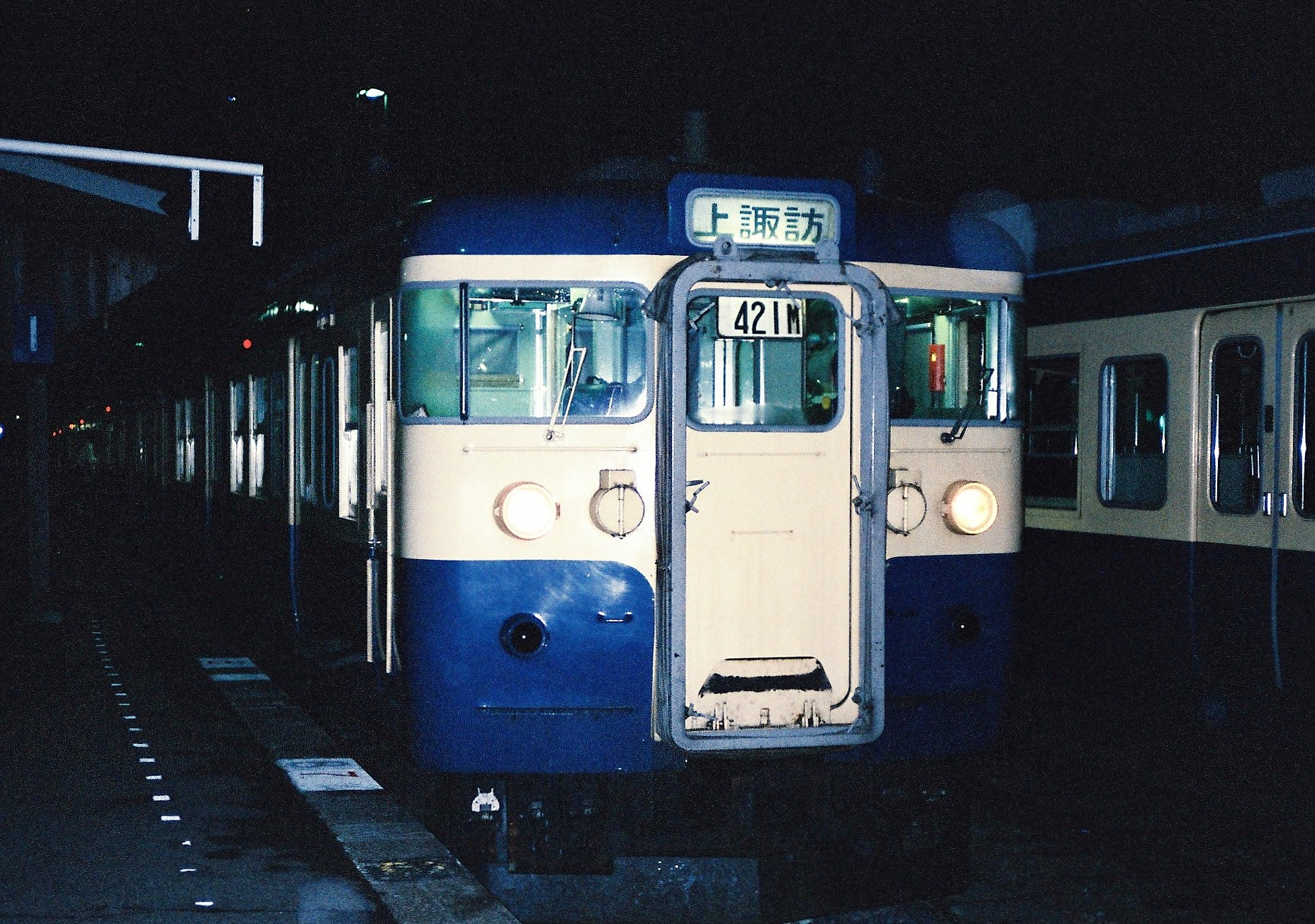 中央線の普通夜行列車上諏訪行き（小淵沢駅、1989年3月22日）